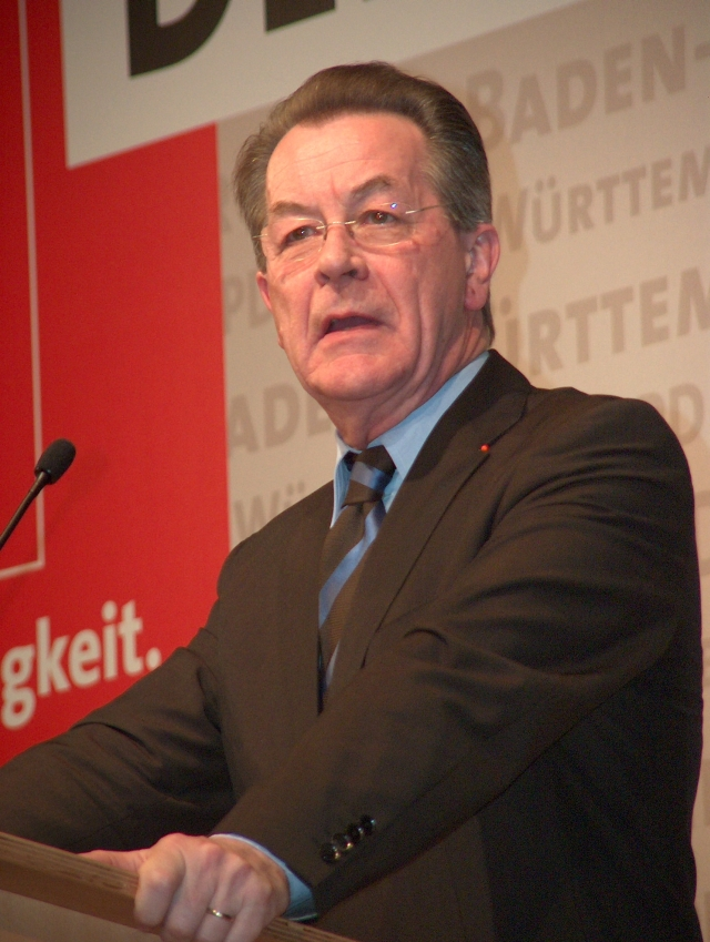 Franz Müntefering, 1.3.06, Neckarsulm, Politischer Aschermittwoch